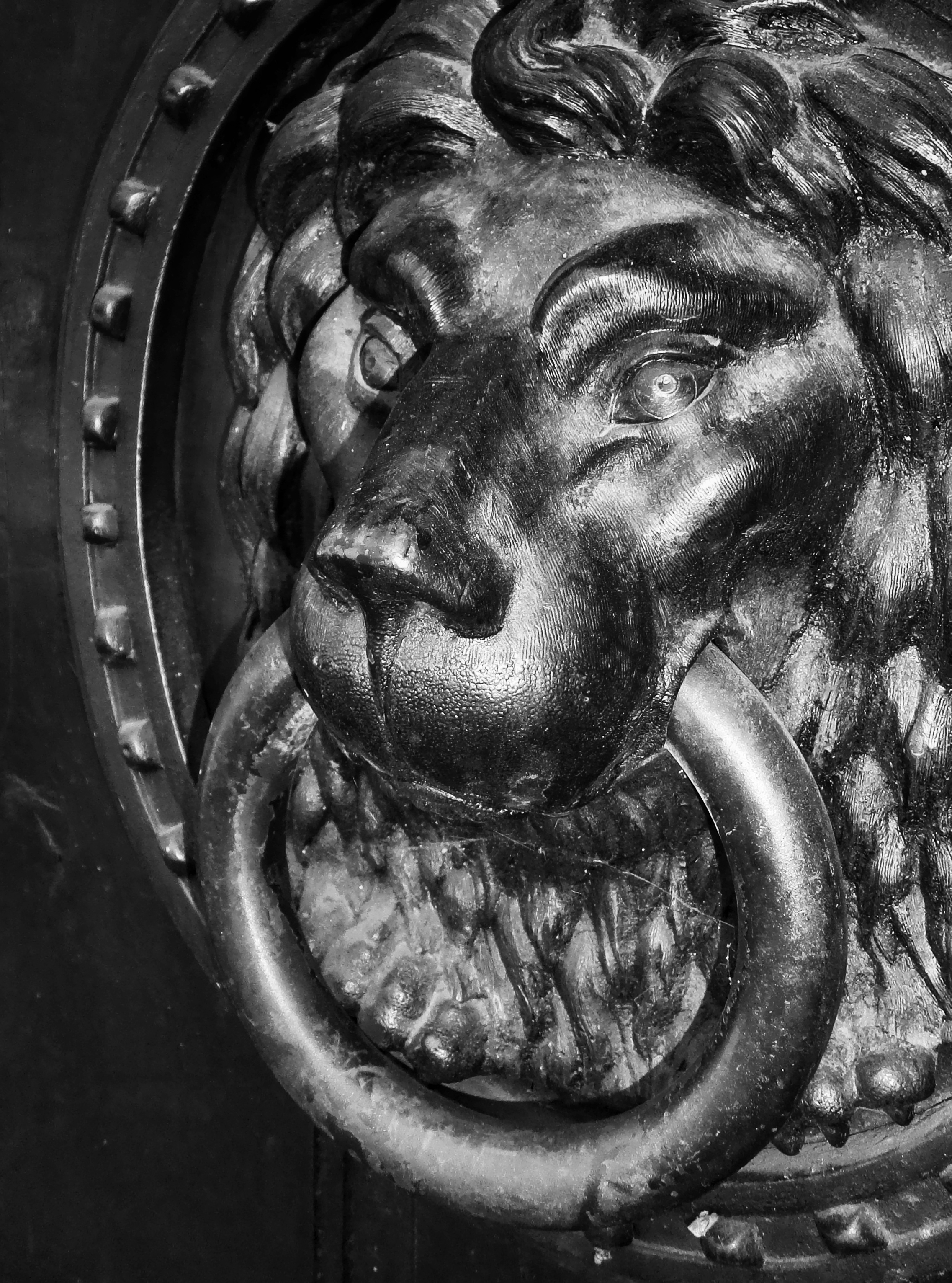 Zvekir sa ulaznih vrata u konak.